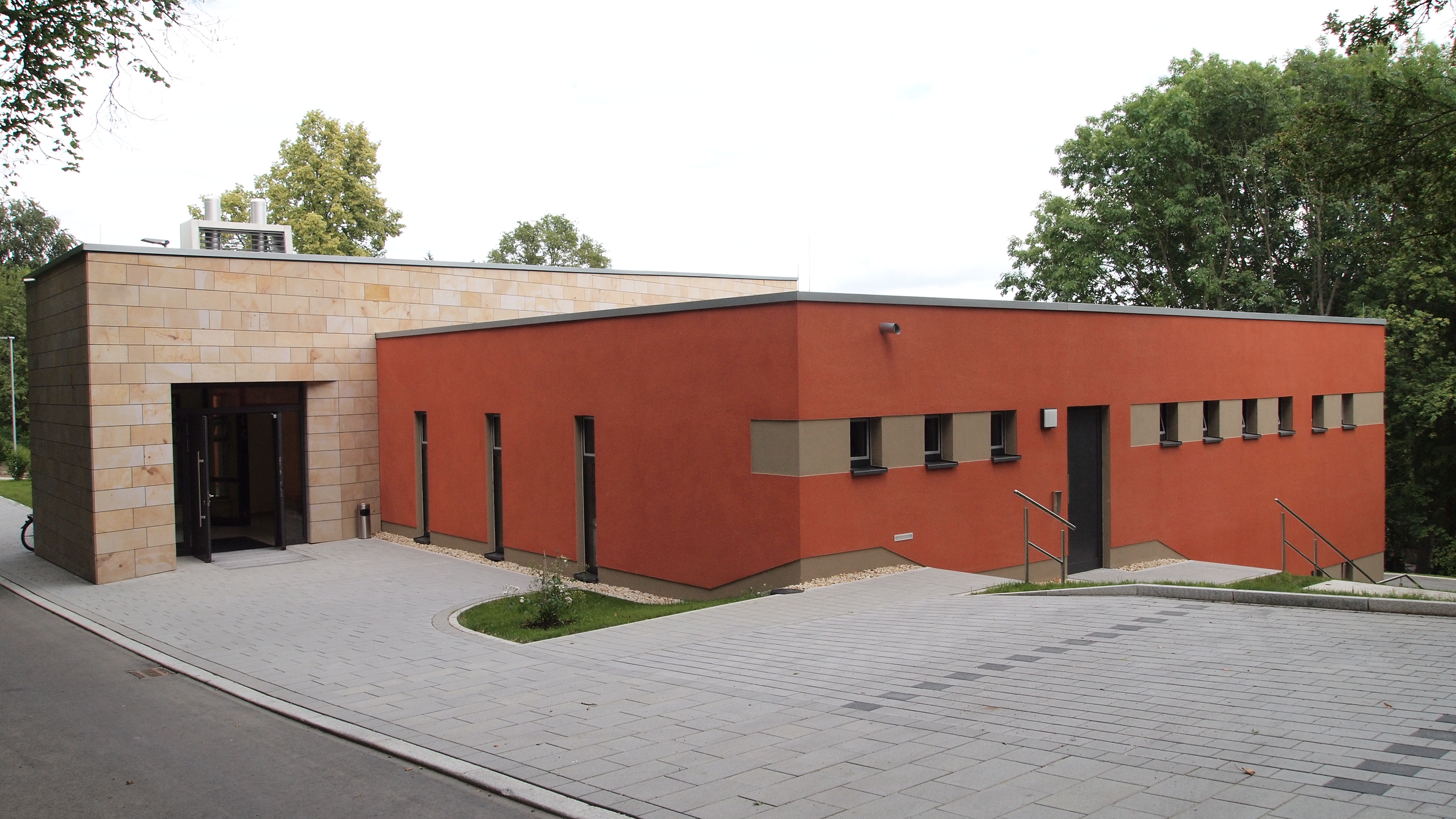 Krematorium auf dem Nordfriedhof Jena (Neubau 2016), Eingang für Besucher